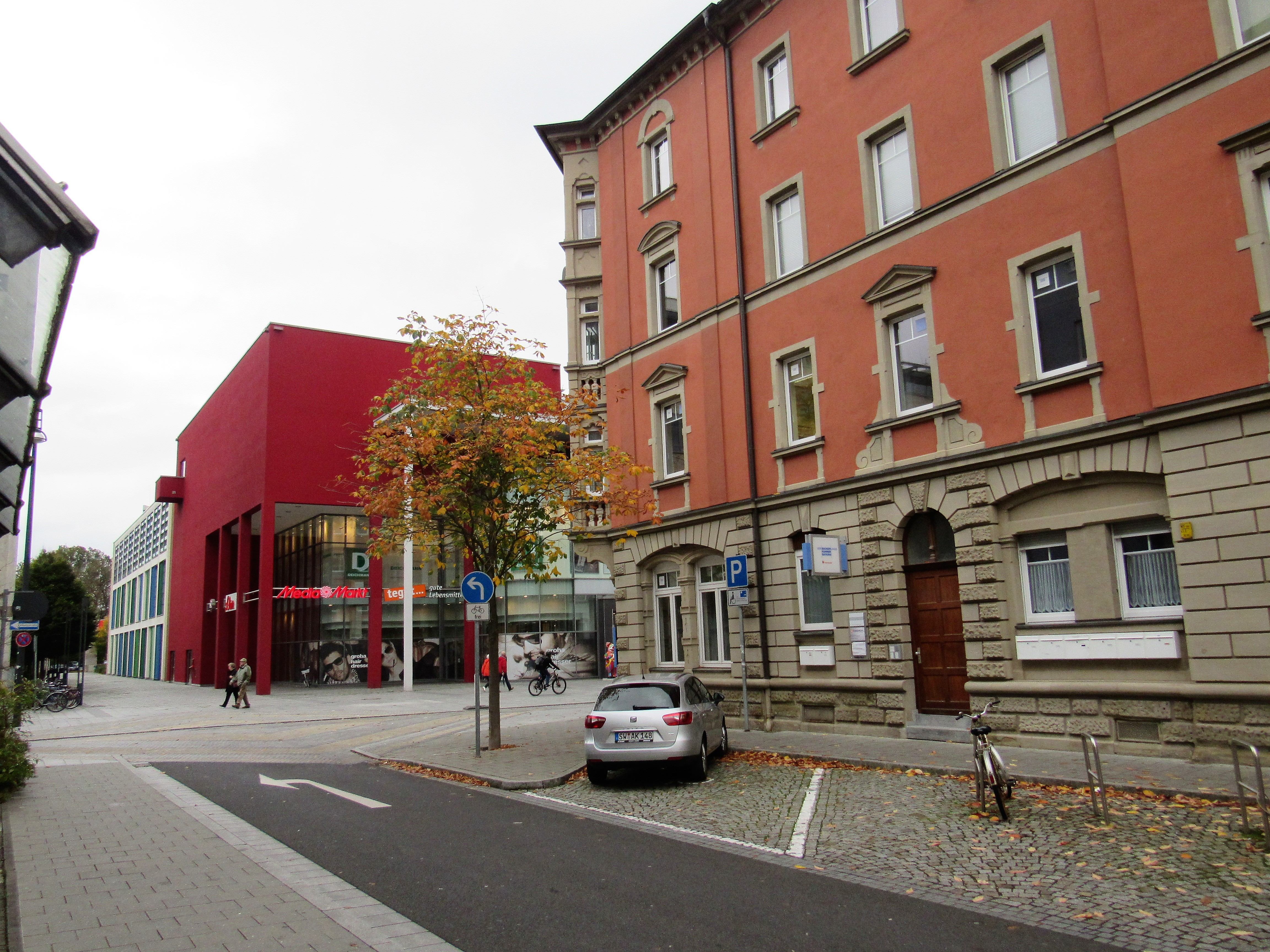 Schweinfurt, Eingang zur Einkaufsgalerie mit Eckhaus der Sattlerstraße